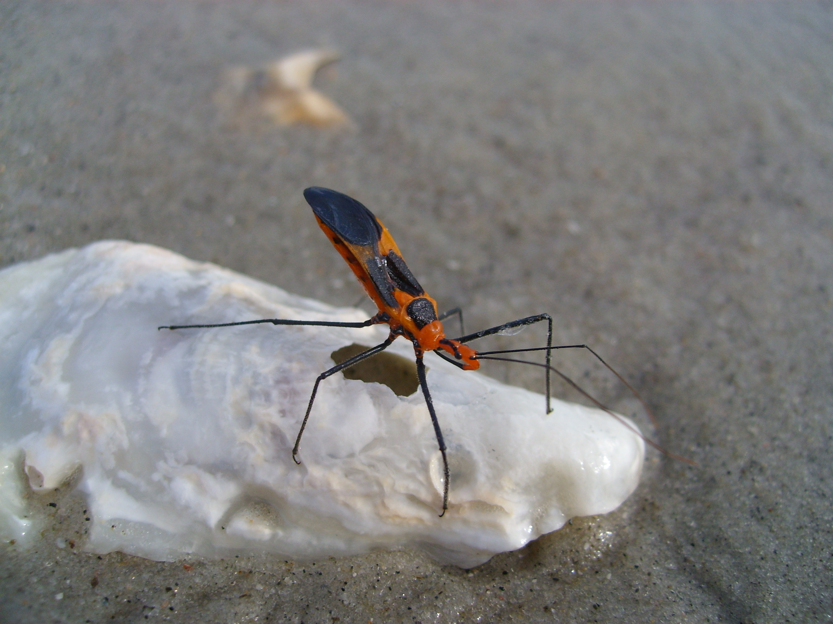 Milkweed Assassin Bug